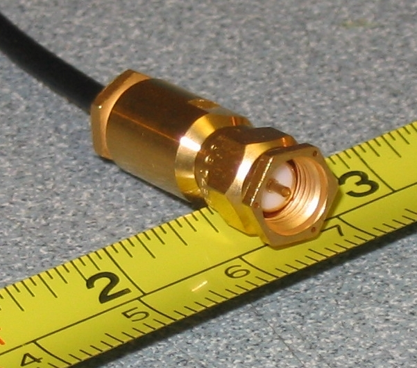 SMA connector